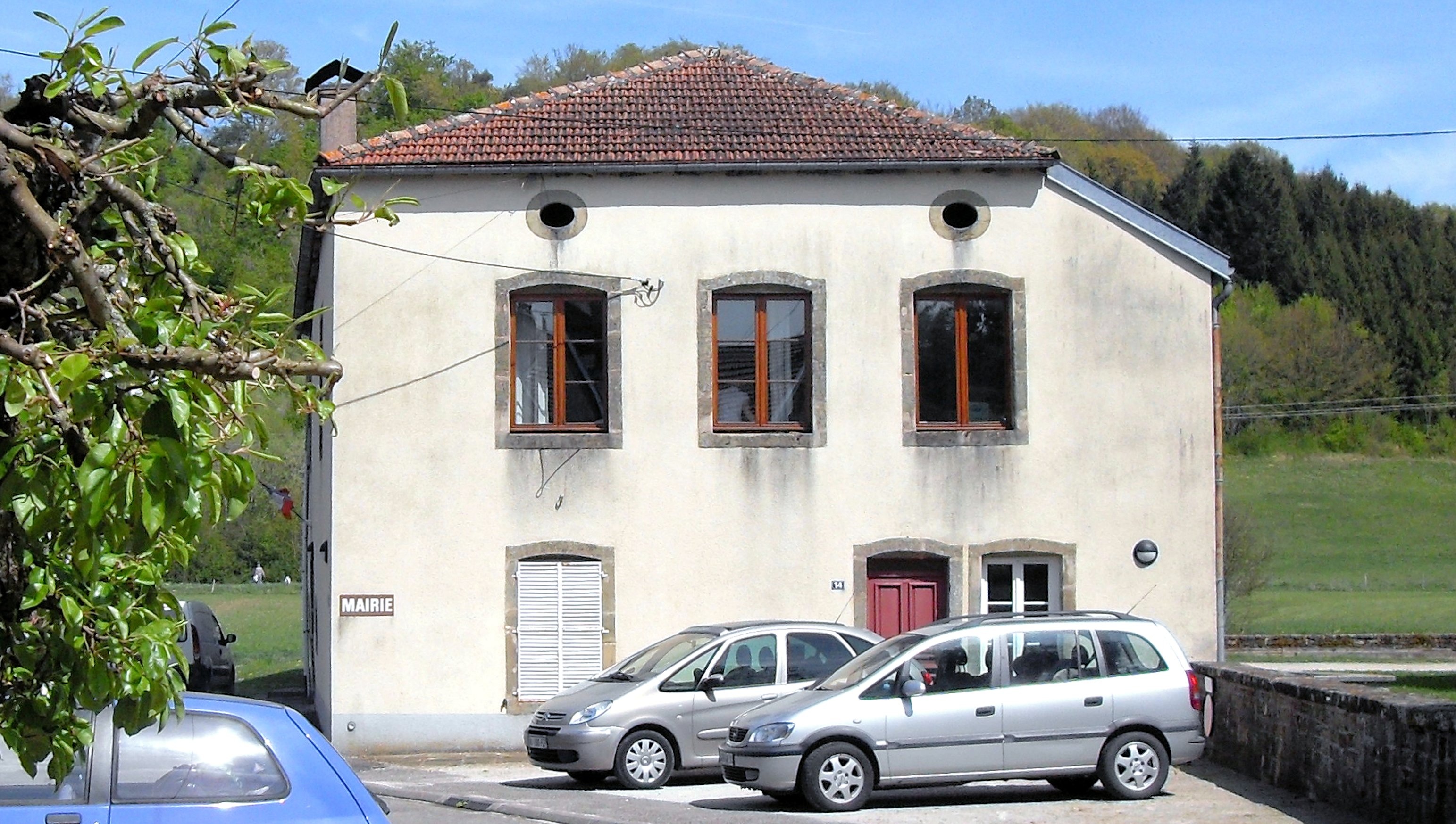 La mairie de Rozières-sur-Mouzon